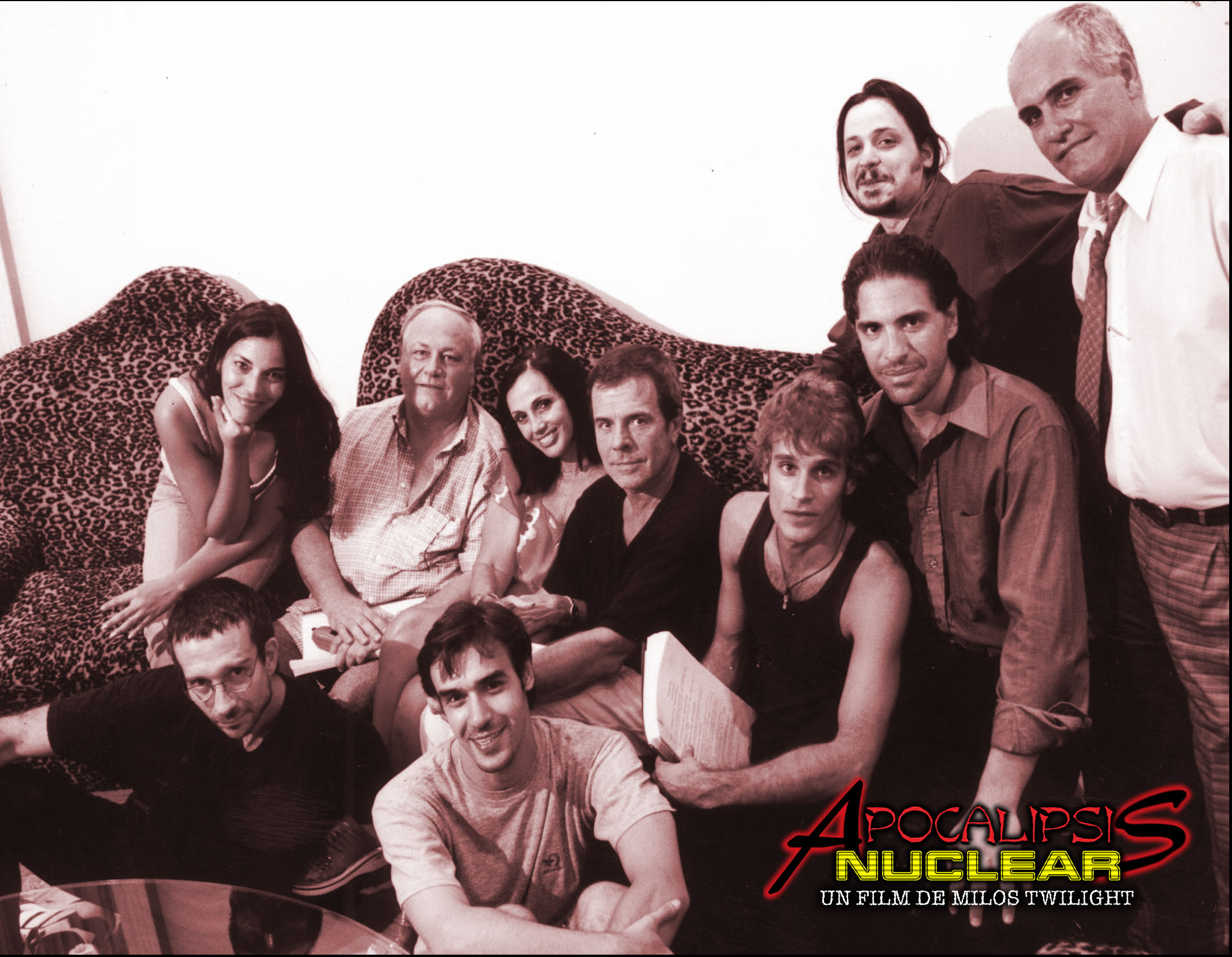 Elenco de la Pelicula Peligro Nuclear